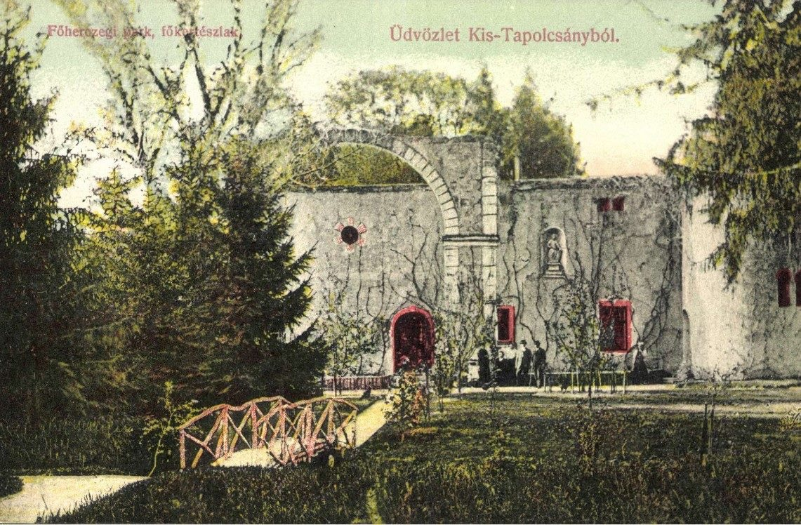 Ansicht mit der Wohnung des Gärtners